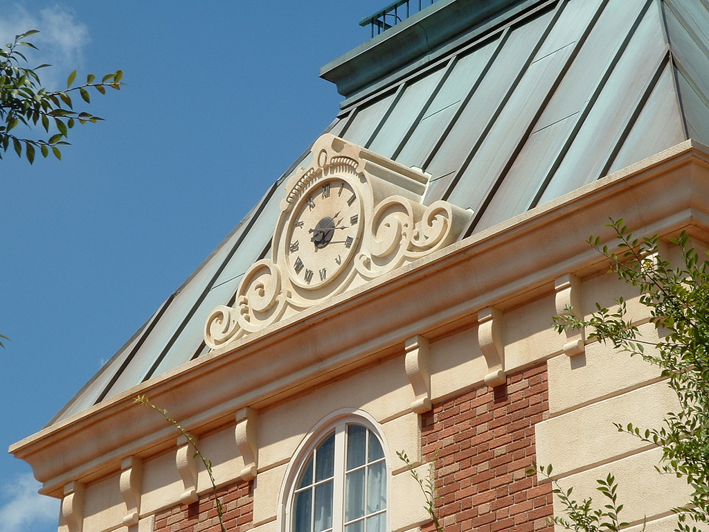 Hidden Mickey renversé, sur une façace d'Epcot.